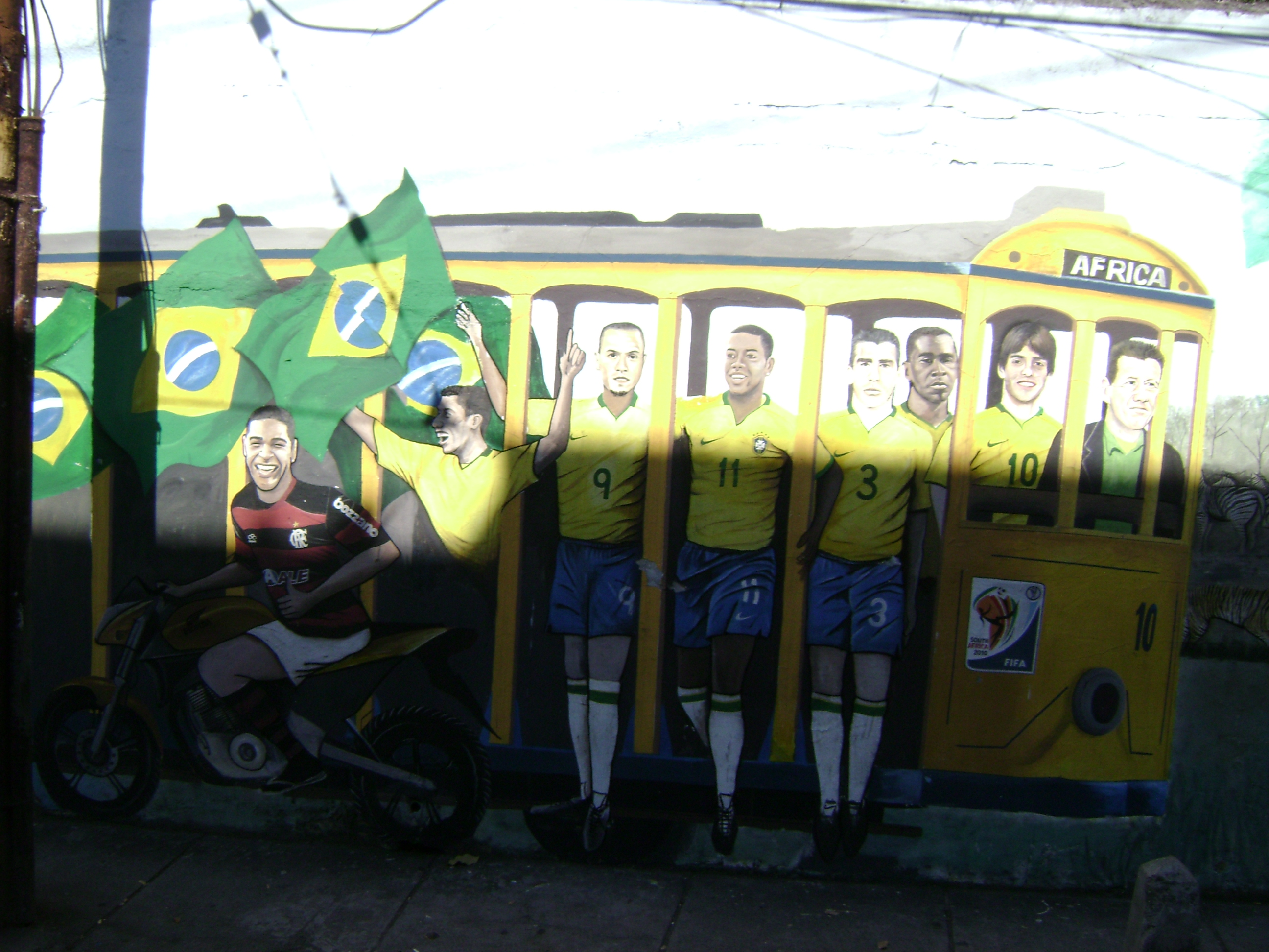 Bonde da seleção brasileira no bairro de Santa Teresa, na cidade do Rio de Janeiro, Brasil.